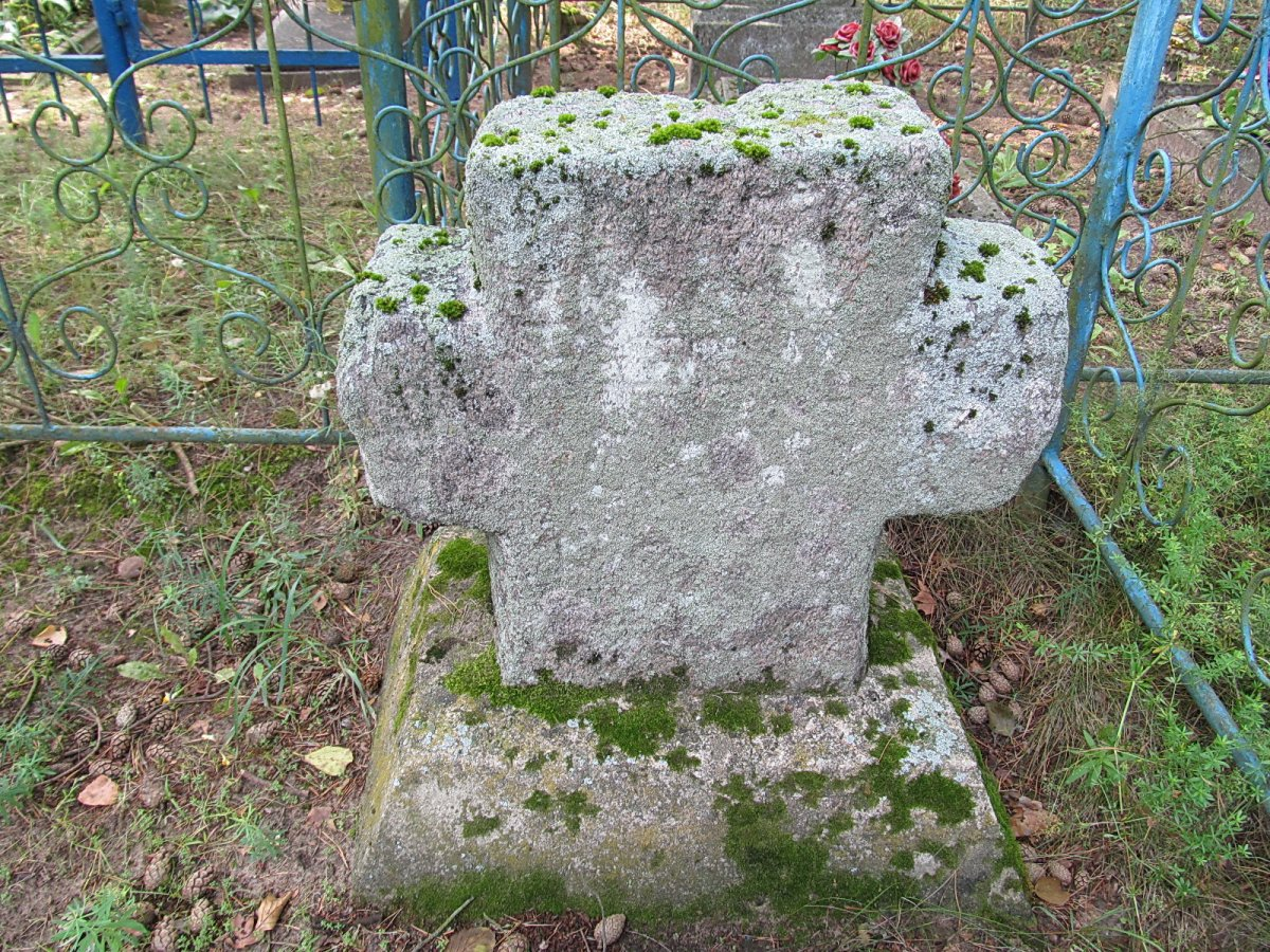 Пераброддзе. Могілкі